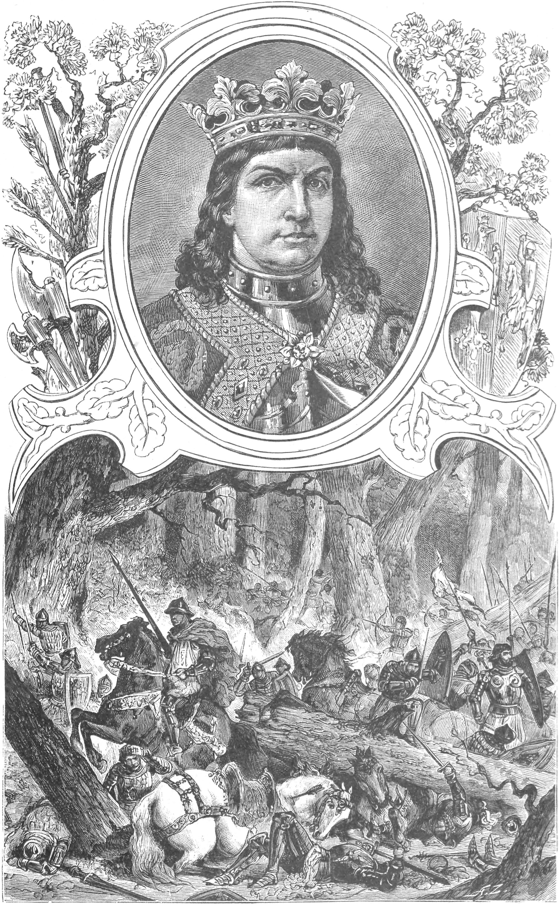 ilustracja z książki „Wizerunki książąt i królów polskich“